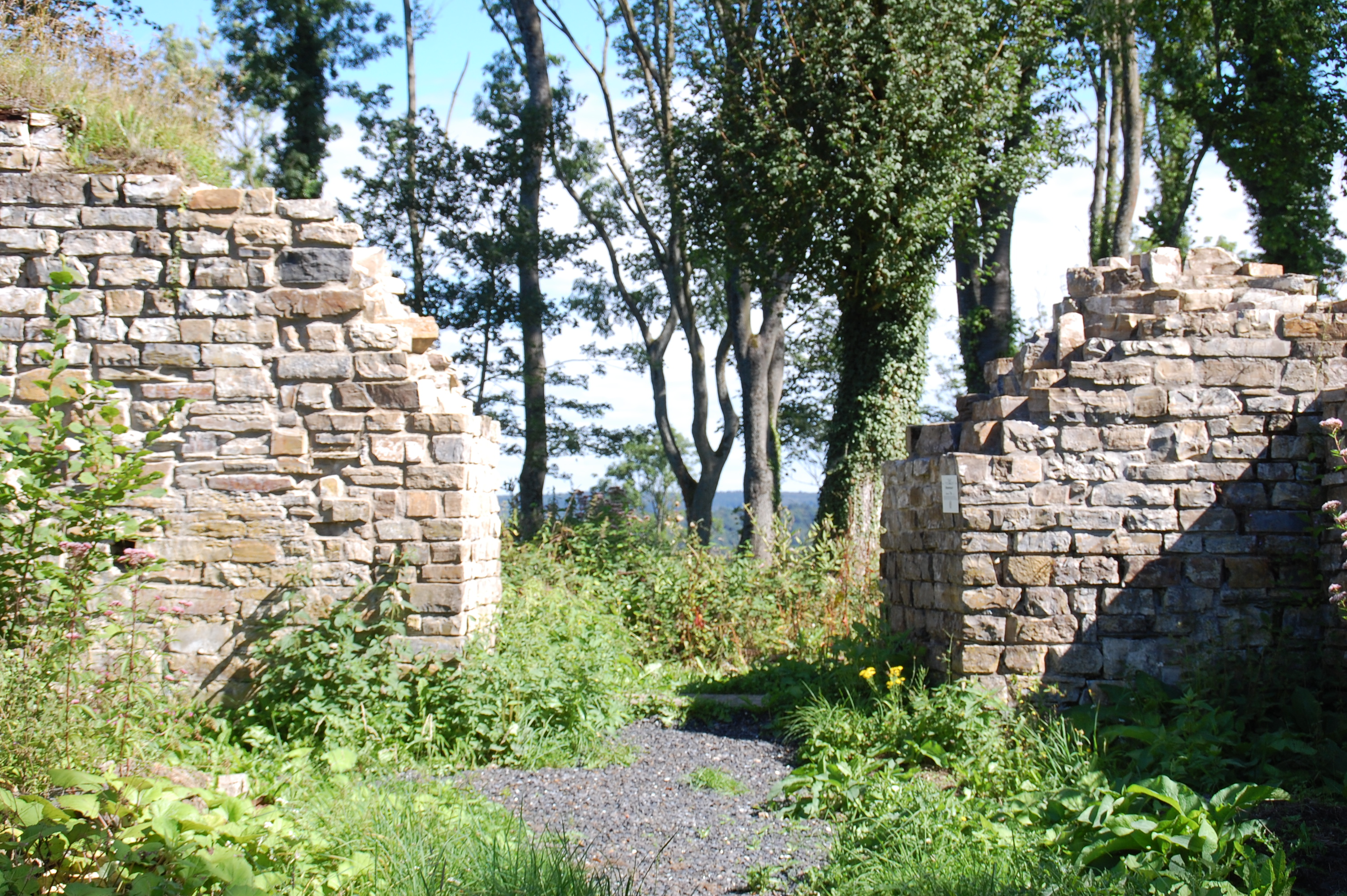 Rüdenburg Arnsberg, Zustand 2016